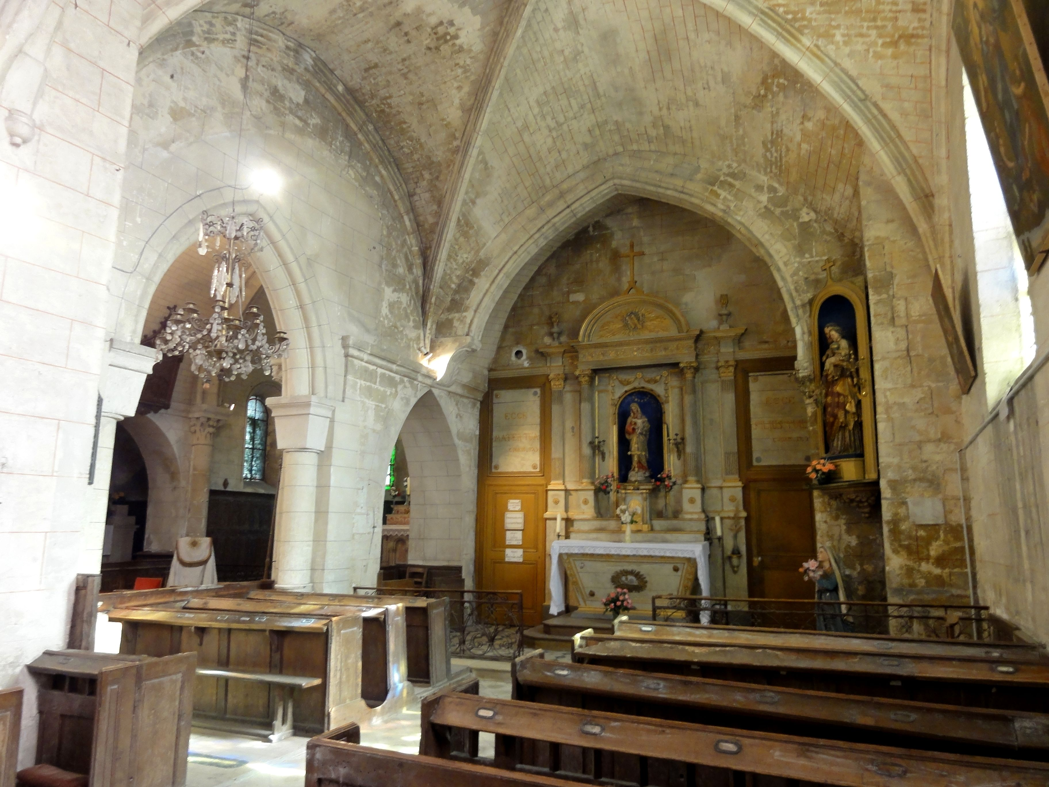 Chapelle sud, vue vers l'est.